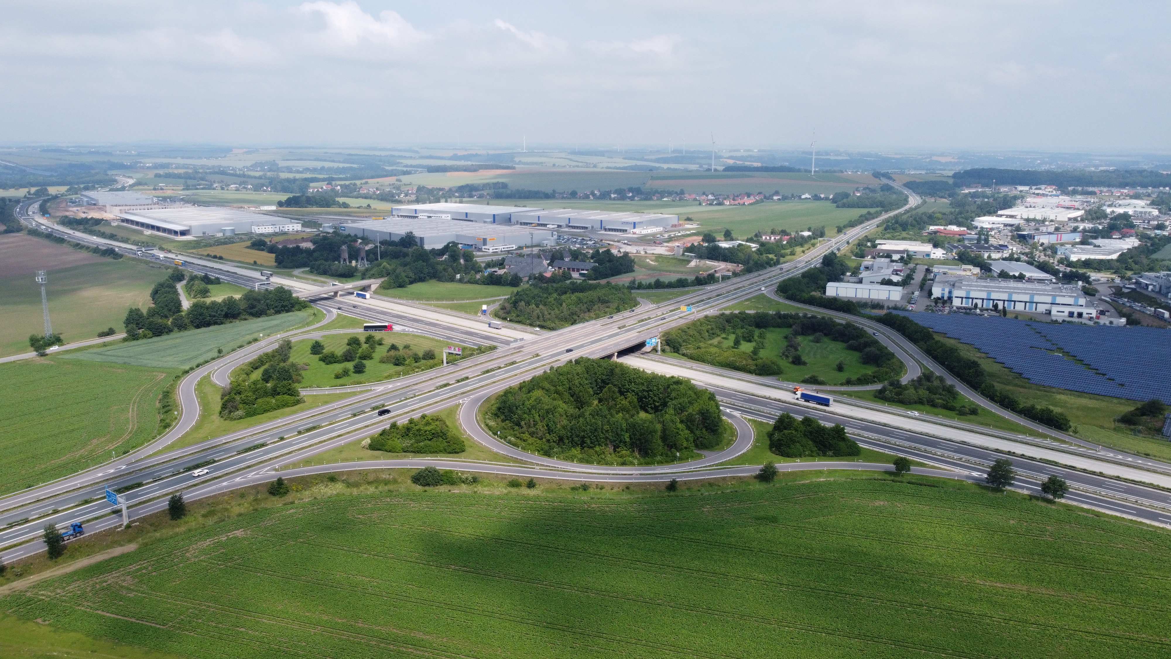 Luftaufnahme der Autobahnanschlußstelle Meerane der BAB A4 mit der Bundesstraße B 93, Blickrichtung Nordwest